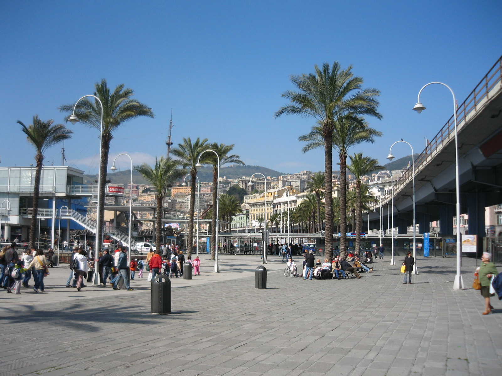 Genova, passeggiata lungo il Porto Antico, lambito dalla Sopraelevata